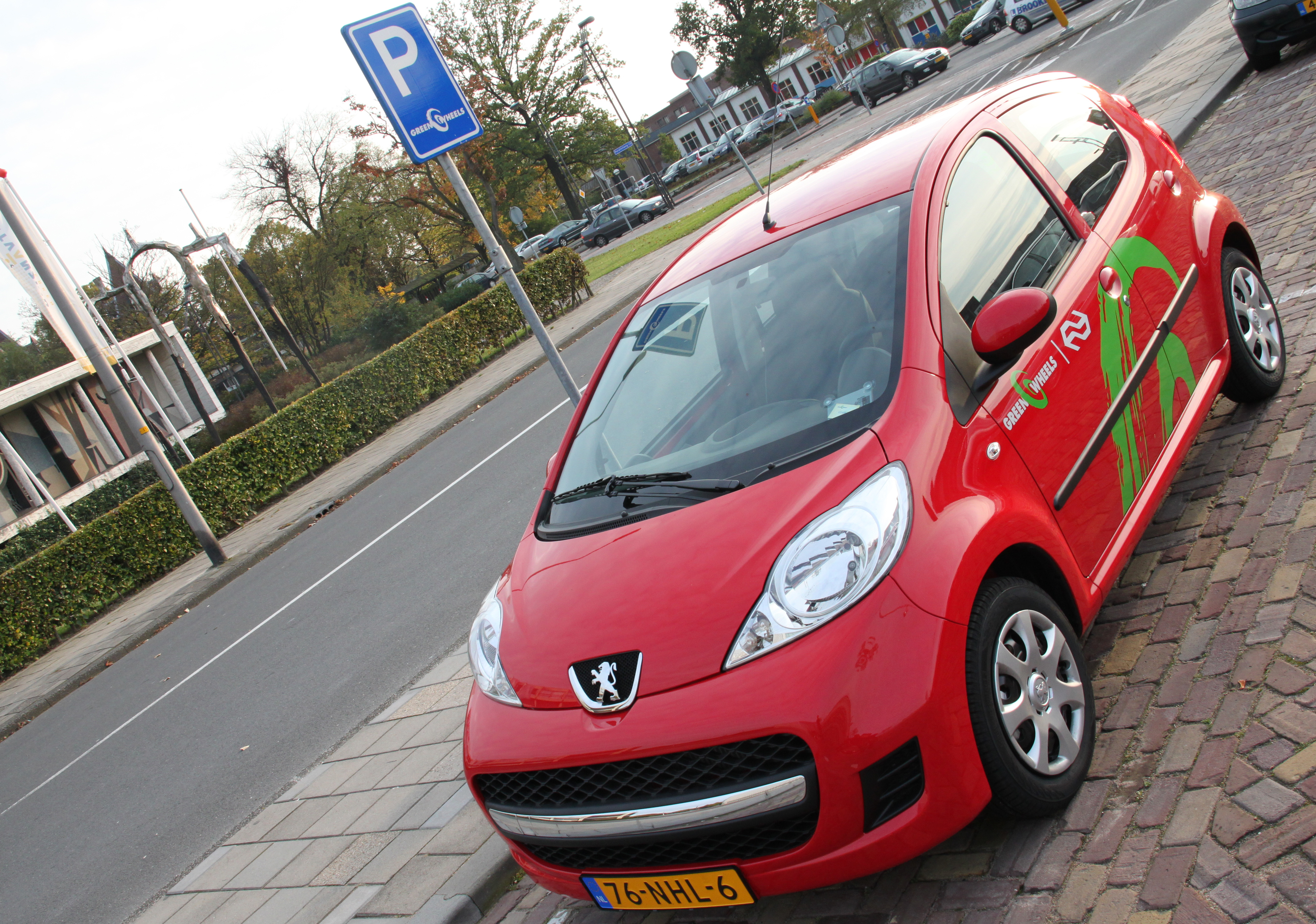 Een Greenhweels-auto aan de achterzijde van station Hengelo.